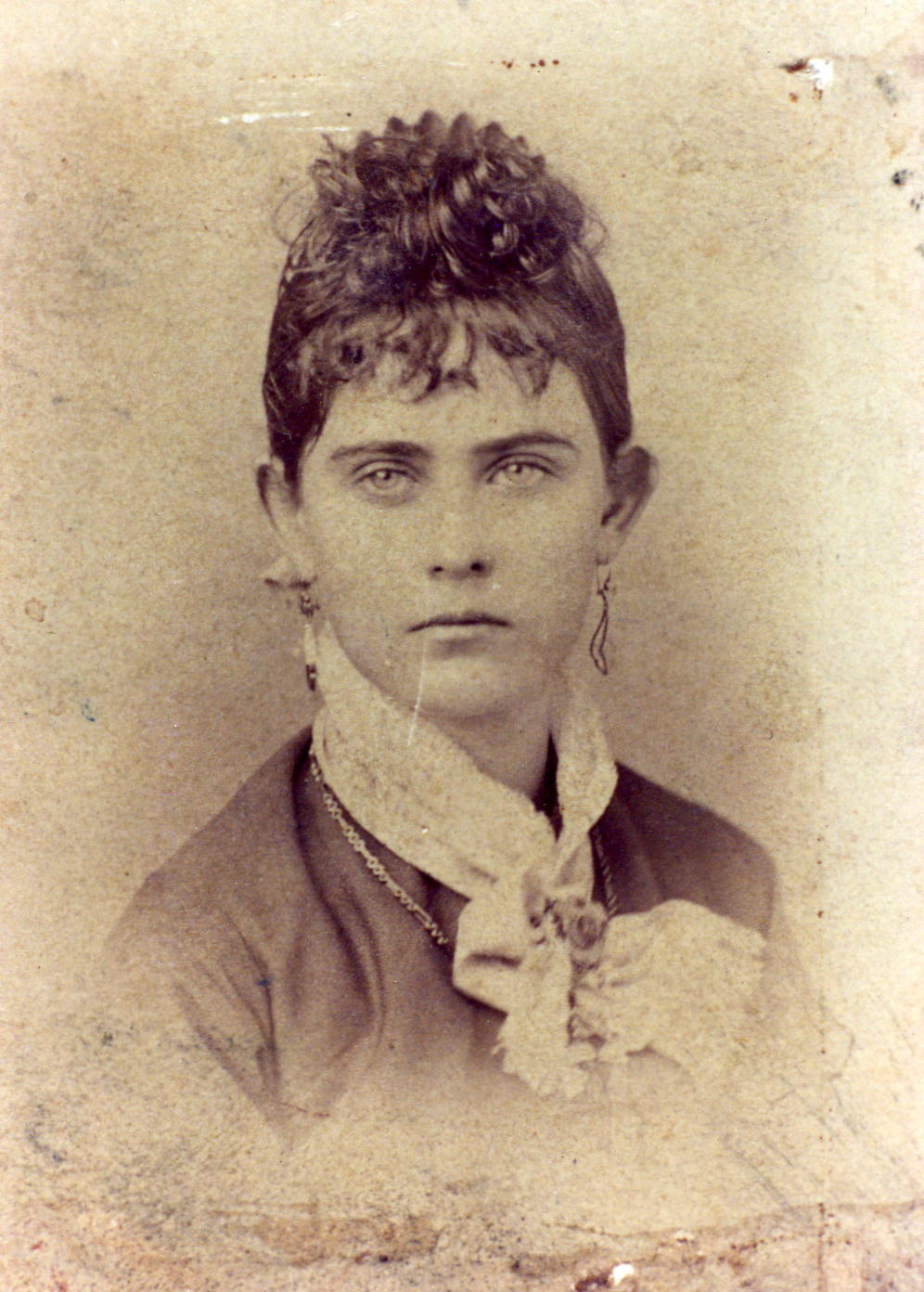 Ida Alice Campbell circa 1880